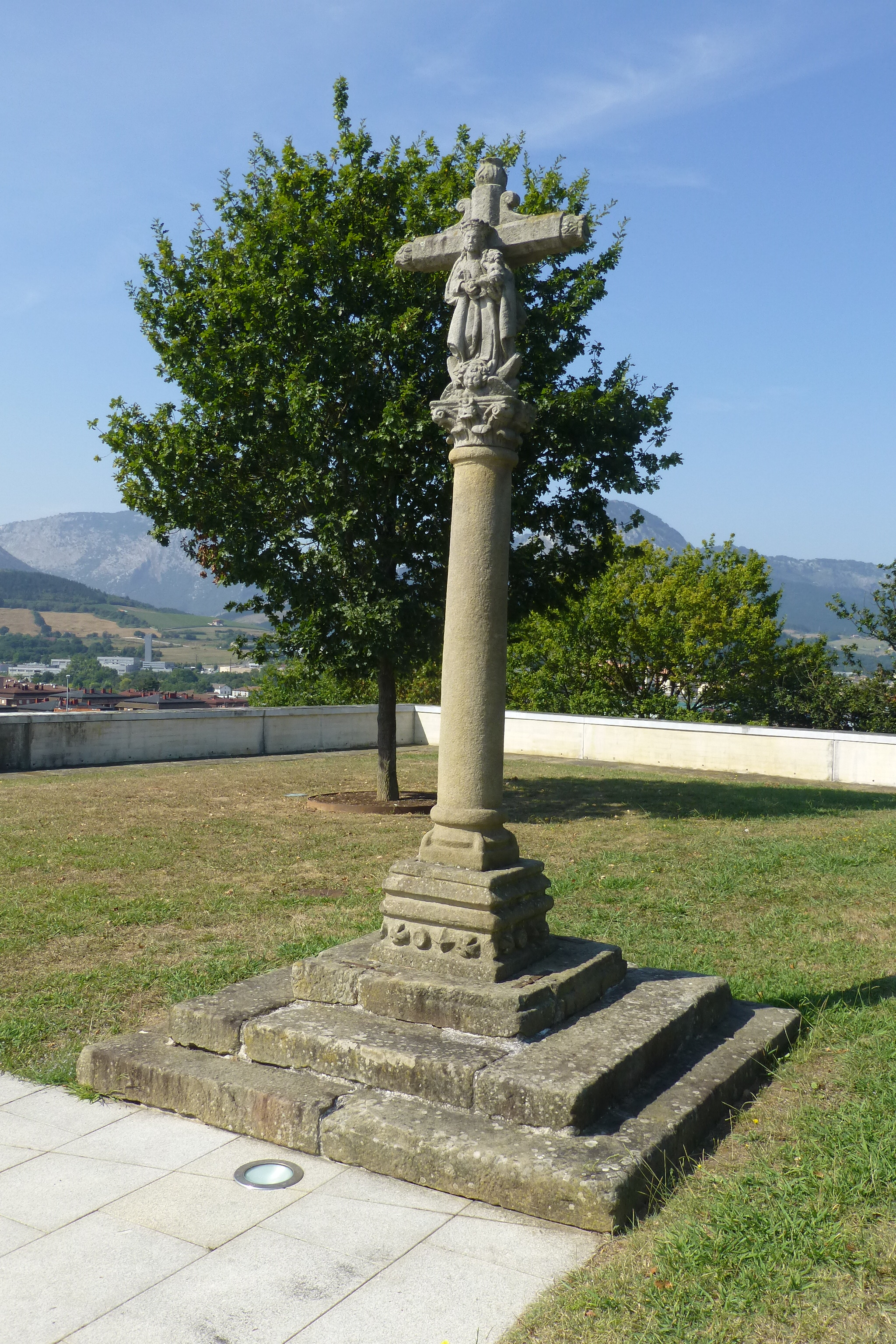 Campa Foral de Gerediaga en en septiembre de 2016. Conjunto Juradero de Gerediaga en Abadiño, Bizkaia, Euskal Herria, se ve el crucero y el roble (recuperado).